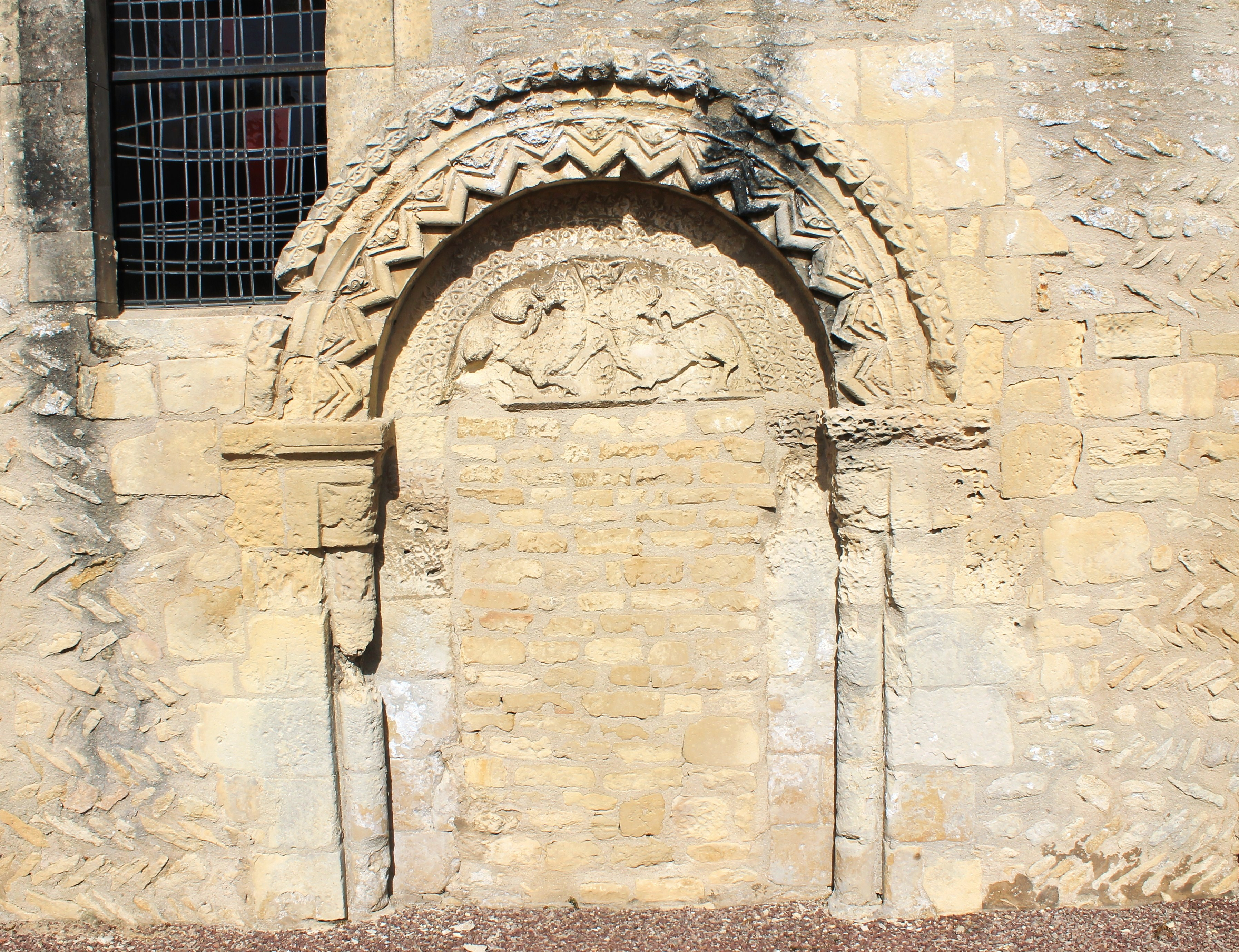 Portail sud de l'église Saint-Vigor d'Authie (Calvados) Le tympan représente deux animaux fantastiques affrontés